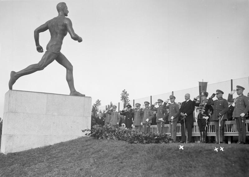 Die feierliche Enthüllung des [Denkmals des] im Luftkampf gefallenen Prinzen Friedrich Karl von Preussen fand im Deutschen Sportforum in Berlin Grunewald statt. Anwesend waren der Präsident des Reichsausschusses für Leibesübungen Staatssekretär Dr. Lewald sowie als Vertreter der Reichswehr der Chef der Heeresleitung General Heye. Das Denkmal des Prinzen Friedrich Karl von Preussen im Sportforum in Berlin Grunewald, nach der Enthüllung. (x) Staatsekretär Dr. Lewald, (xx) General Heye.